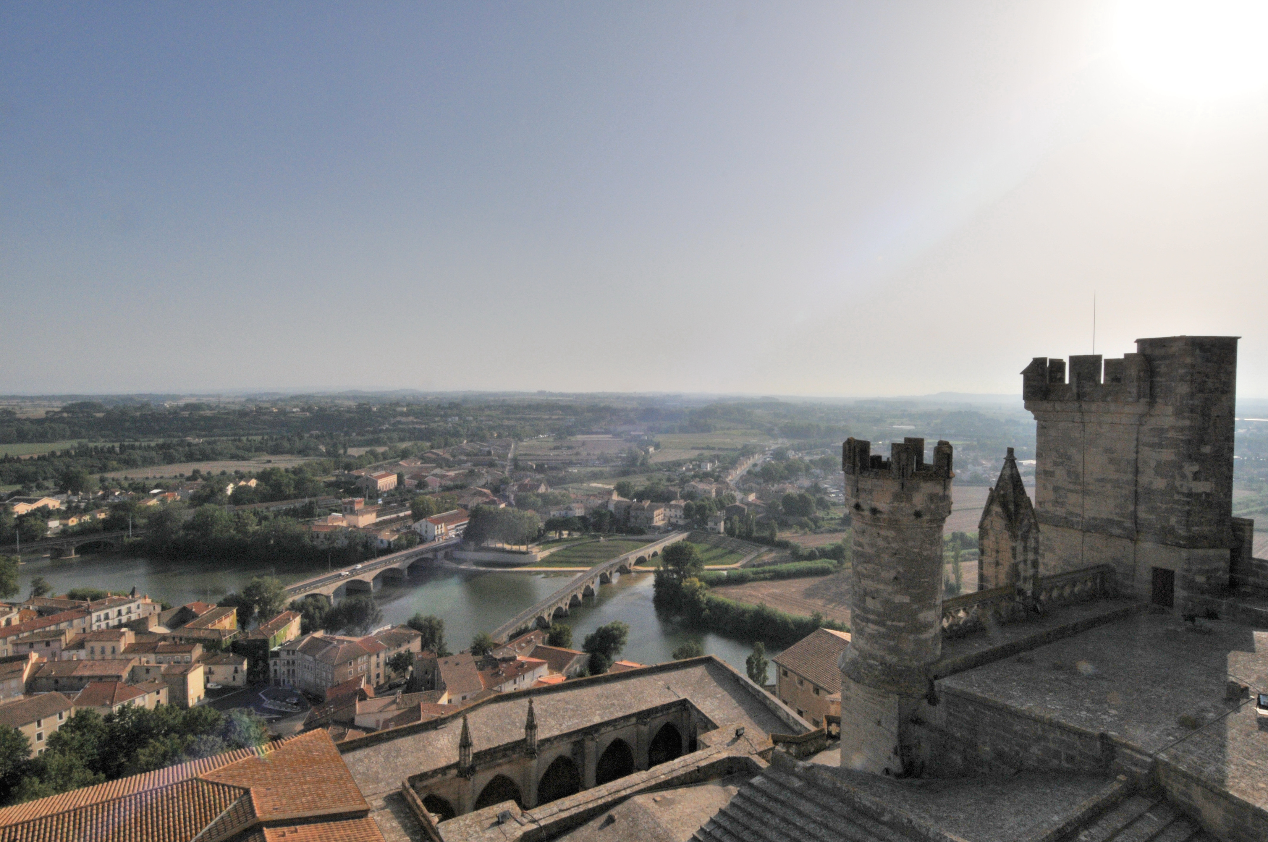 BEZIERS